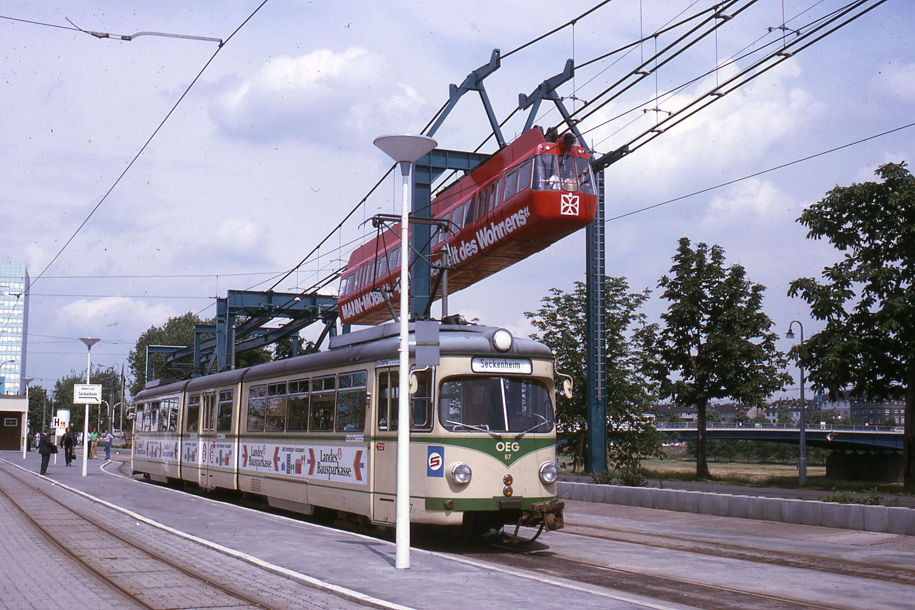 En 1975, les floralies (exposition florale) de Mannheim étaient sur deux sites, l'un au nord, l'autre à l'est, reliés par une sorte de téléphérique automoteur.